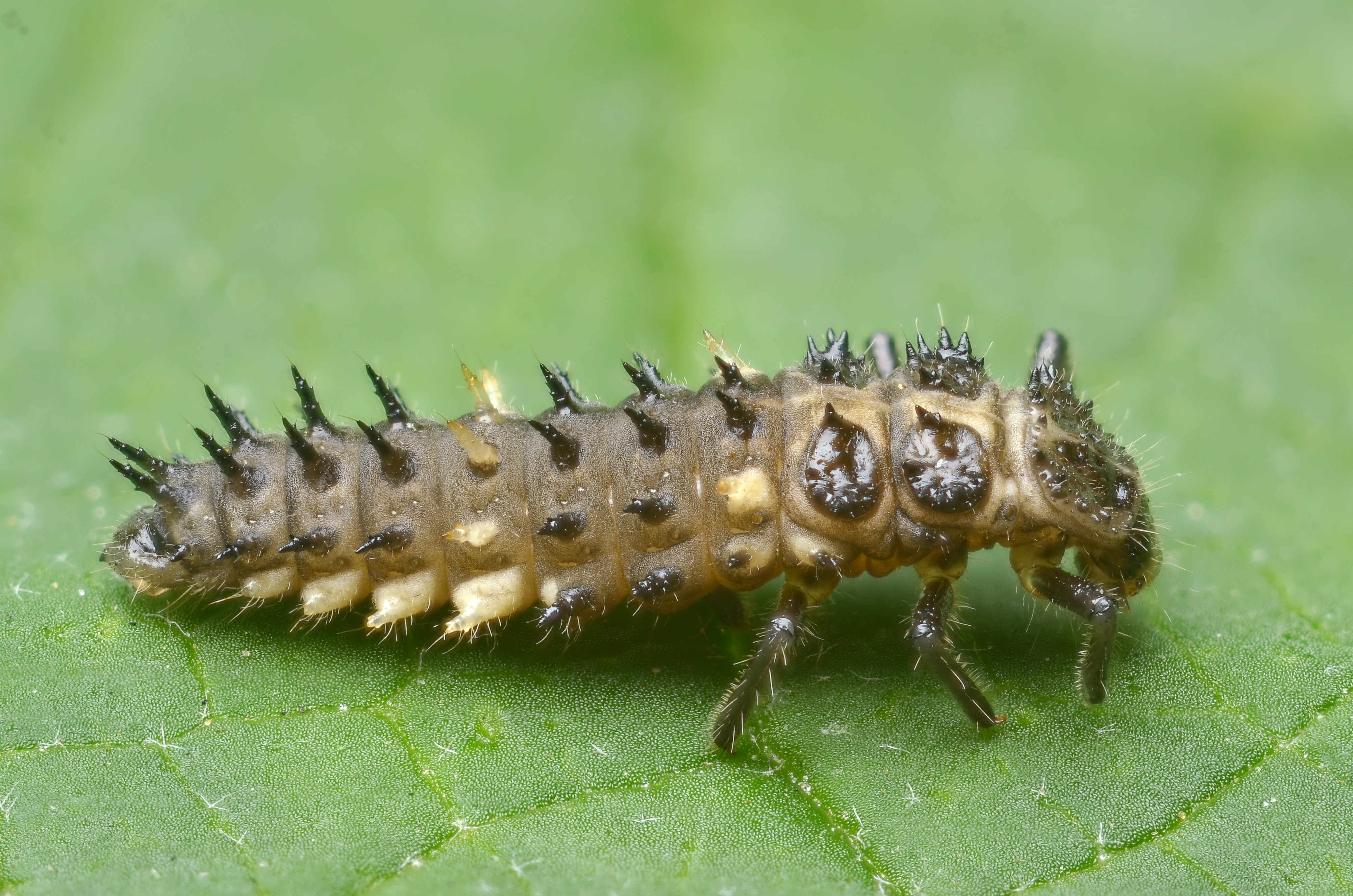 Calvia quatuordecimguttata nymph